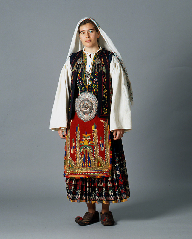 Σαρακατσάνικη φορεσιά από την περιοχή της Γκούρας Κορινθίας. Συλλογή Πελοποννησιακού Λαογραφικού Ιδρύματος, Ναύπλιο